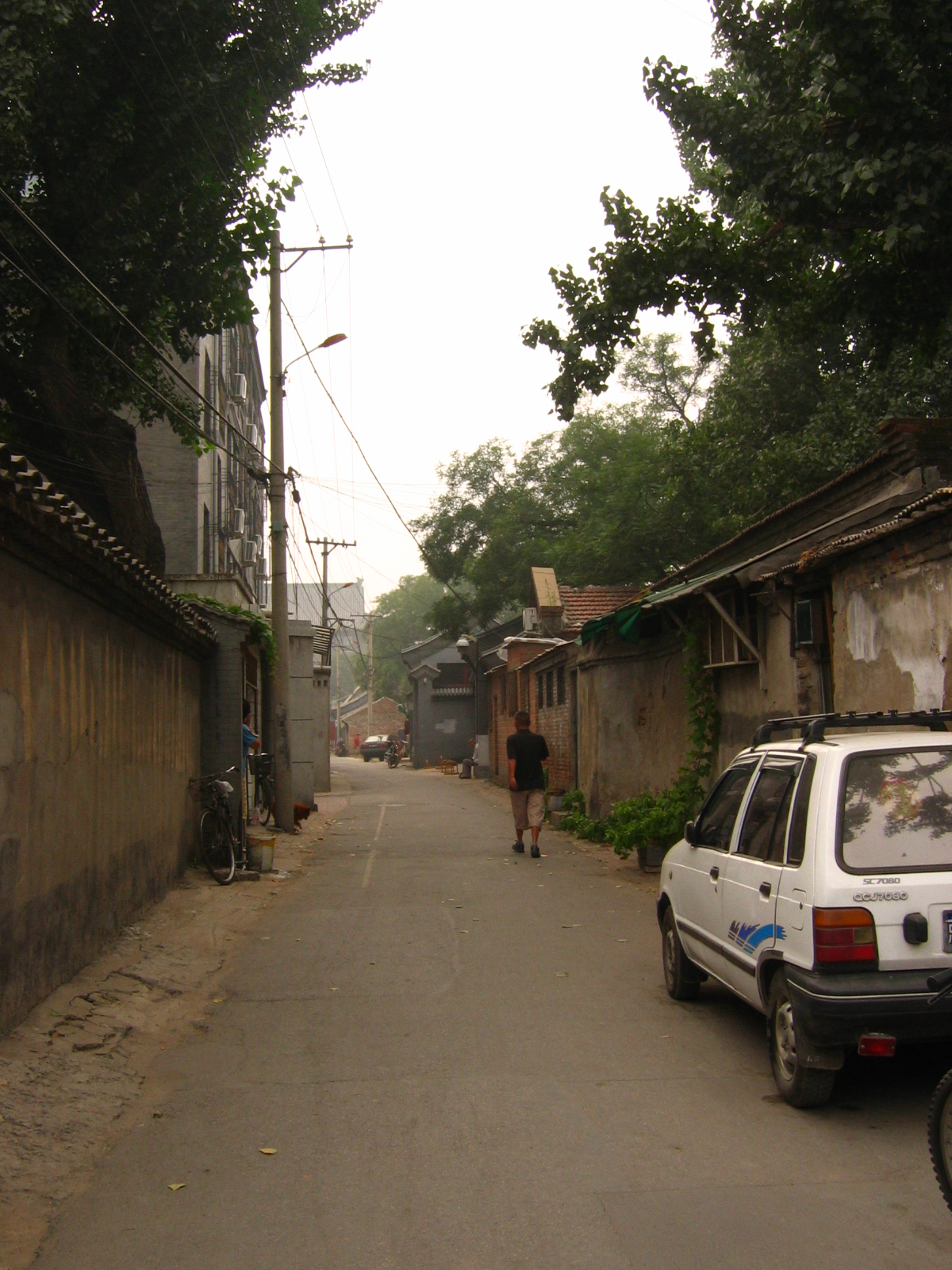 东旺胡同的中间位置